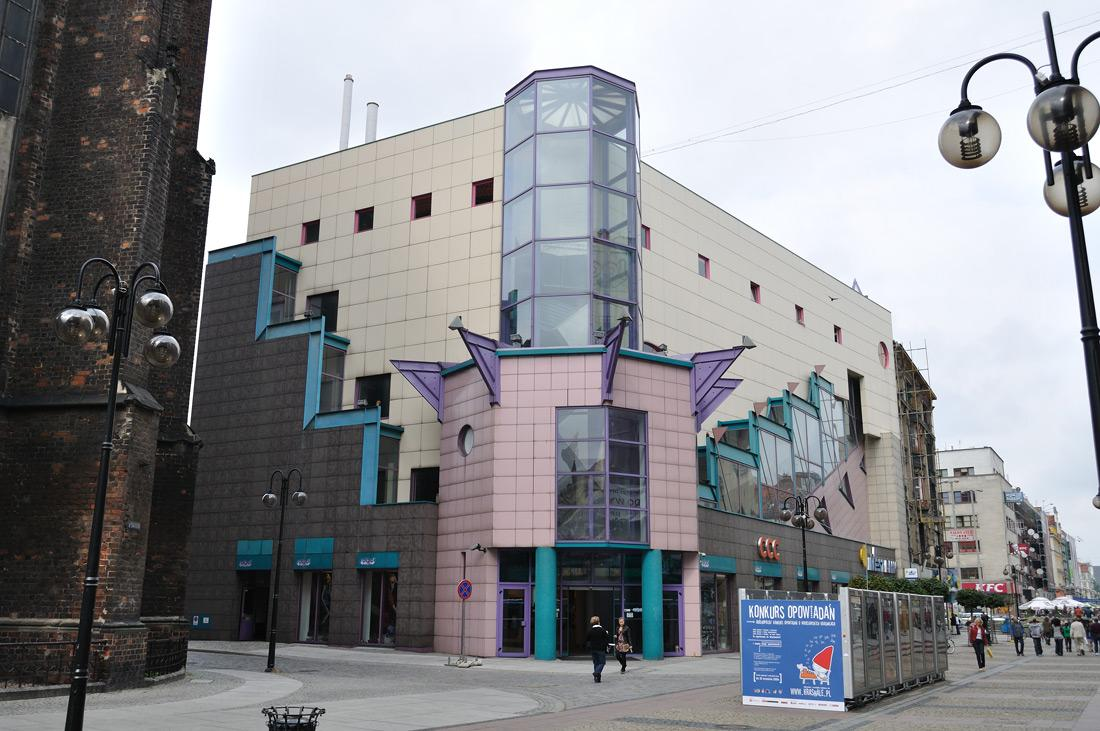 Solpol I. Kiedyś mi się nawet podobał - ponoć pójdzie do wyburzenia bo na jego działce można wybudować coś większego (i dobrze).